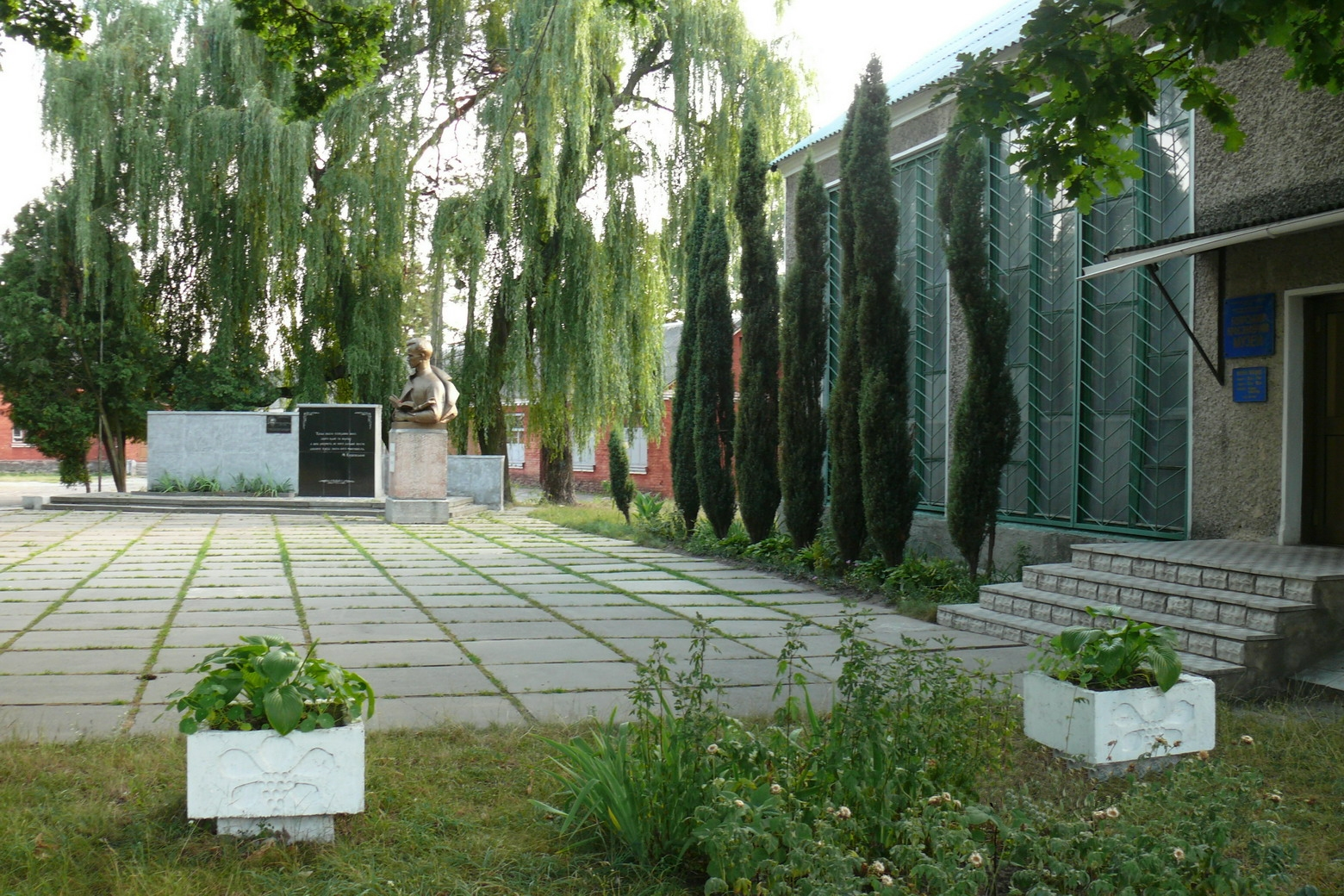 Краеведческий музей